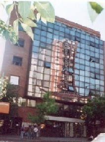 Edificio Brukman-foto año 2003